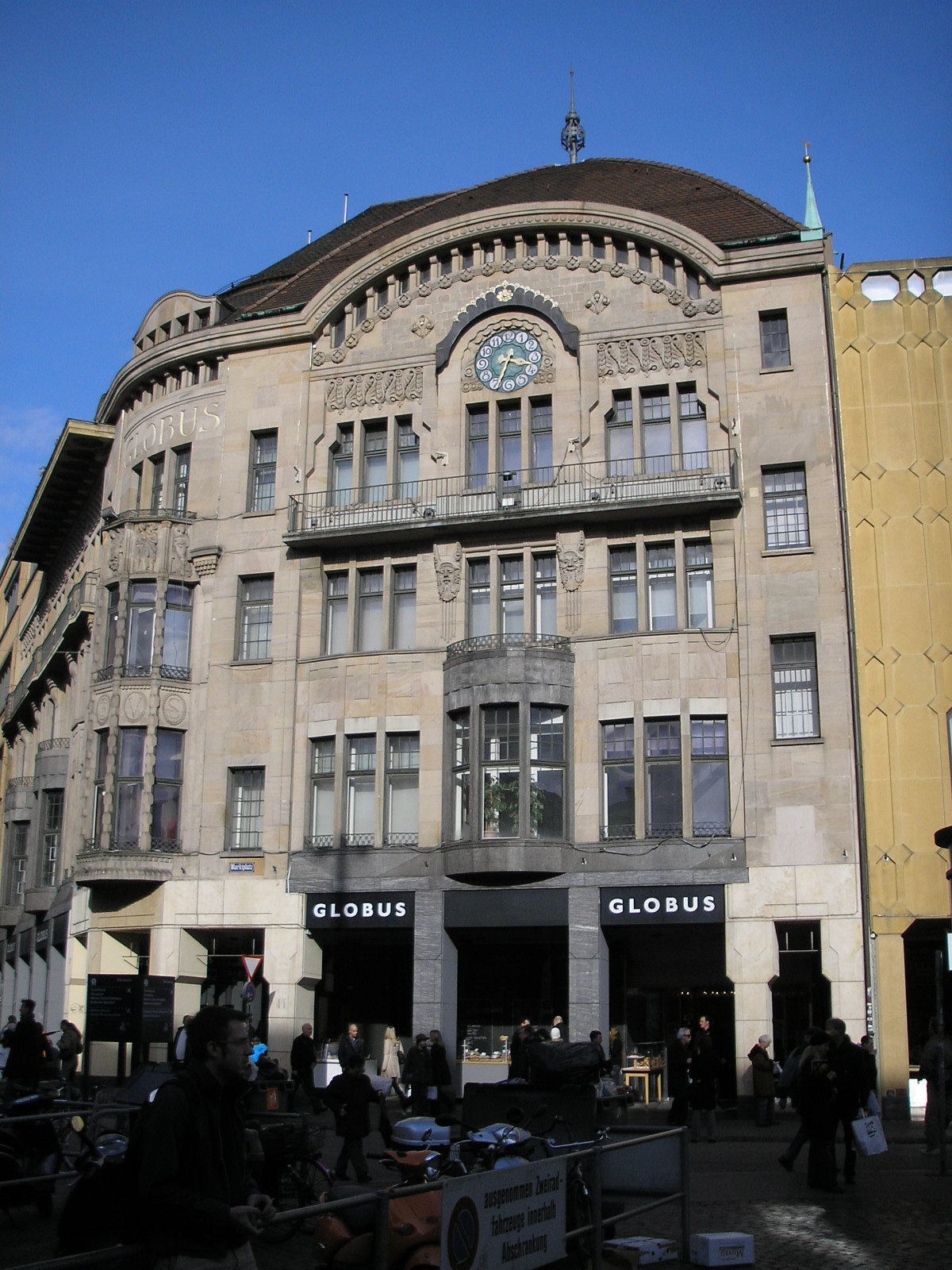 Marktplatz in Basel with Rathaus.